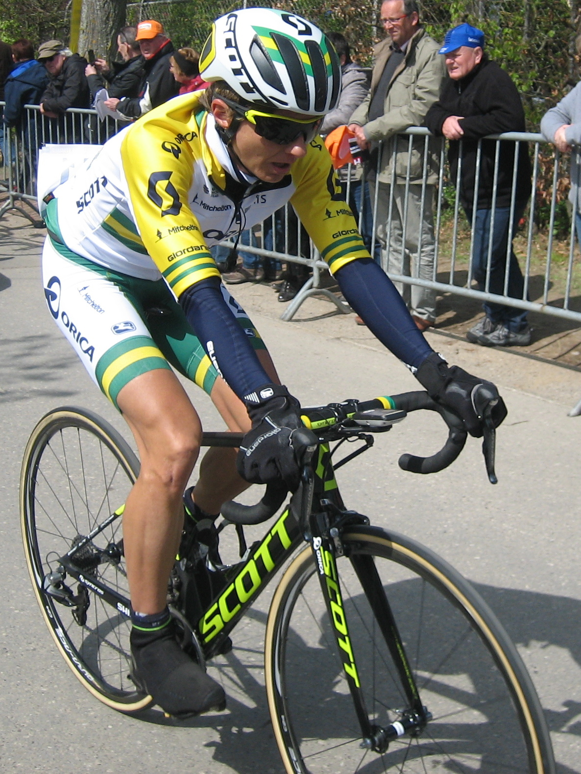 Finish van de Waalse Pijl 2017 in Huy.